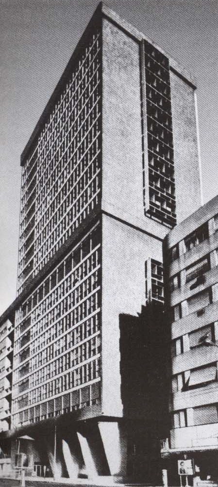 Vista del Edificio República para ENTel Argentina. Avenida Corrientes y Maipú, obra de los arquitectos SEPRA.